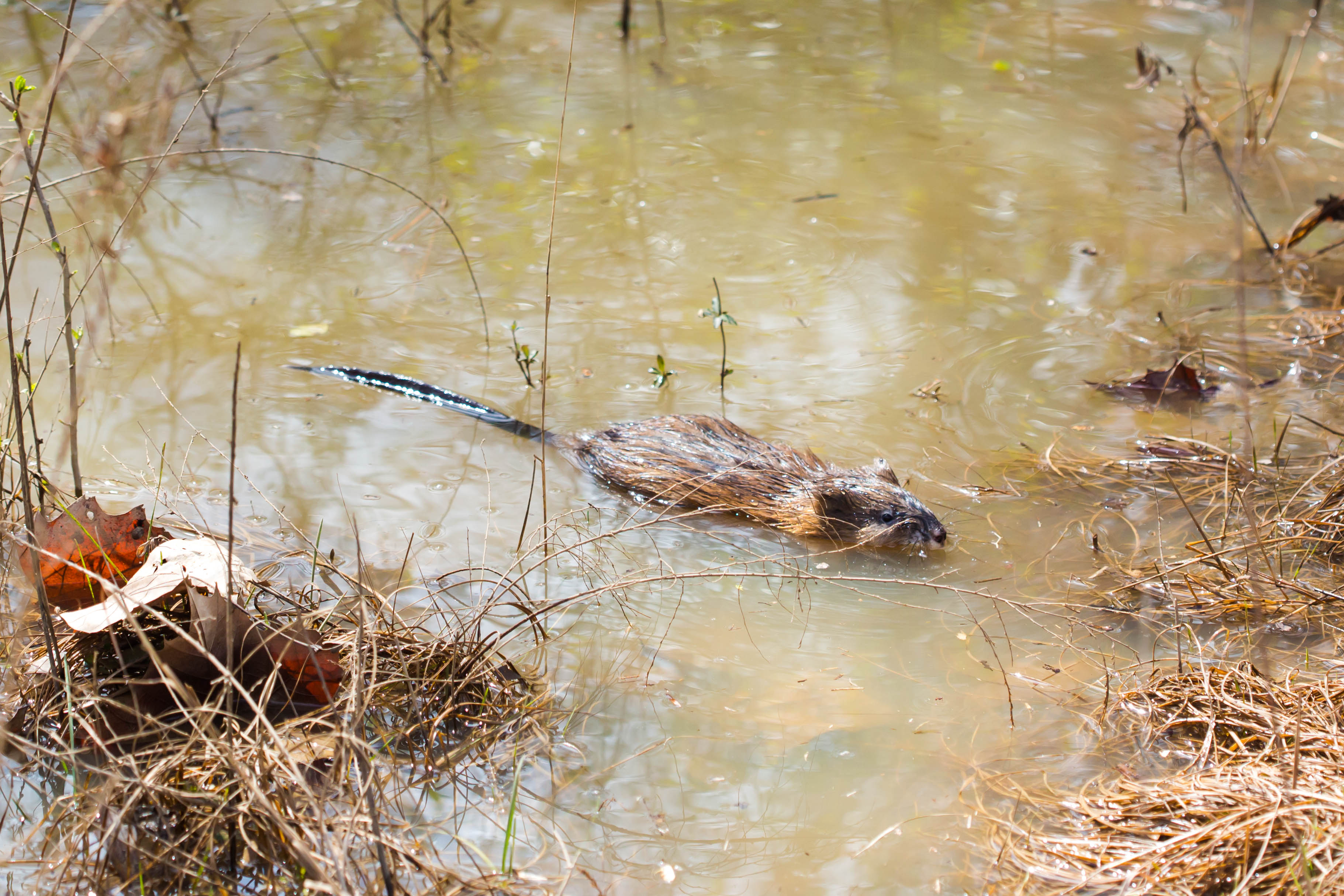 Muskrat